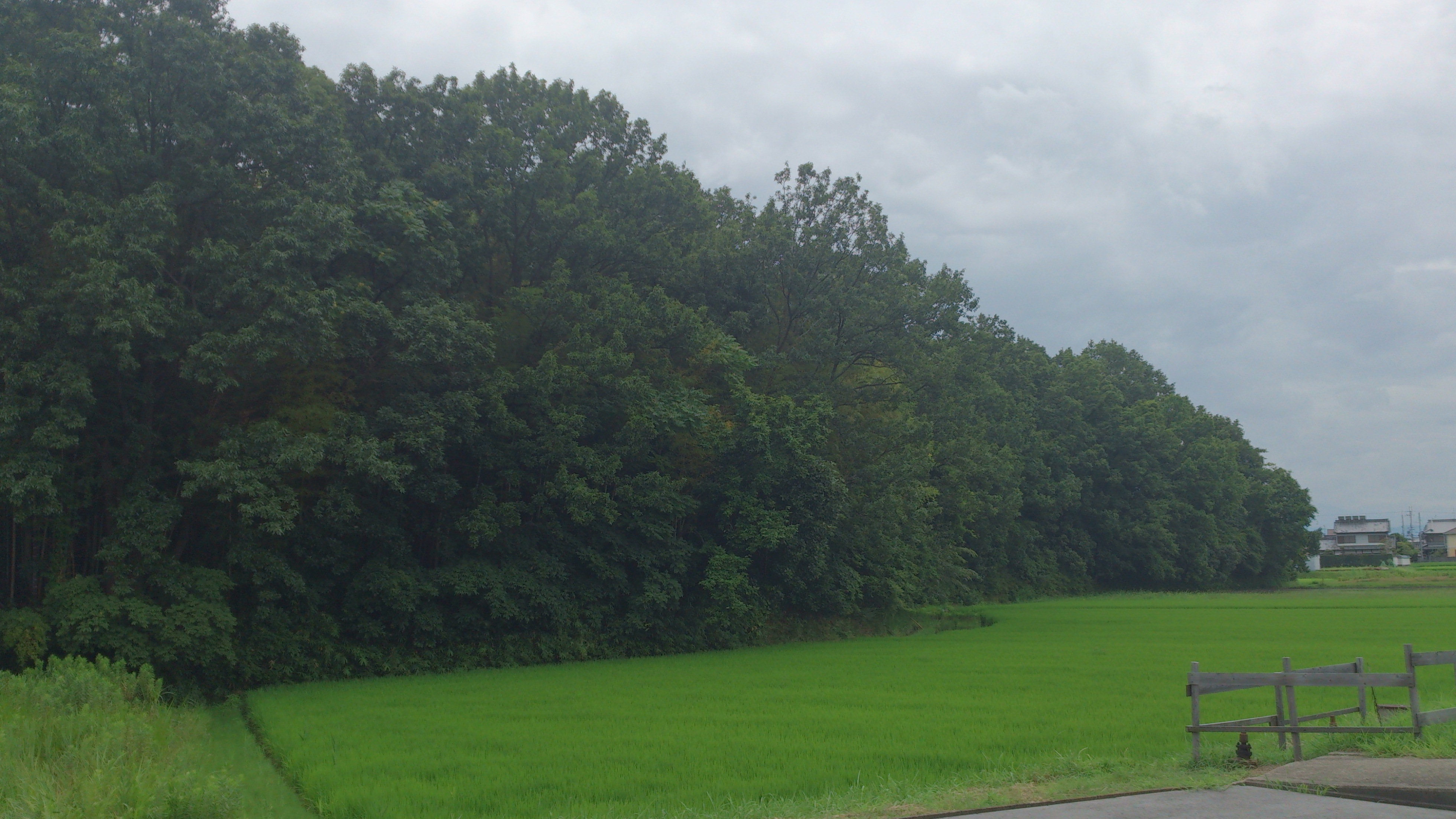 川合大塚山古墳